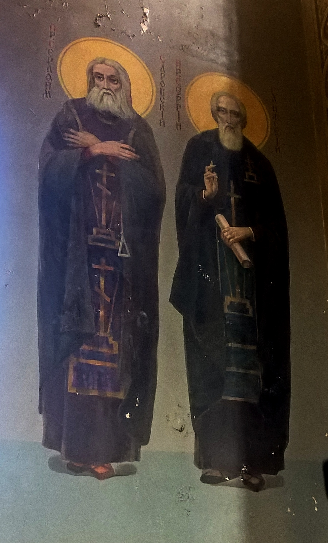 Freski św. św. Sergiusza z Radoneża i Serafina z Sarowa w Cerkwi Wniebowstąpienia Pańskiego w monasterze Nowy Neamț